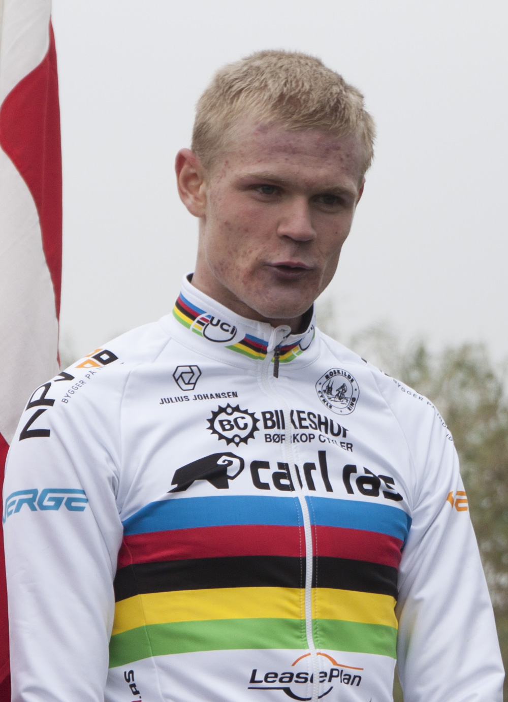 Julius Johansen på podiet ved Sapa-løbet 2017 i Tønder